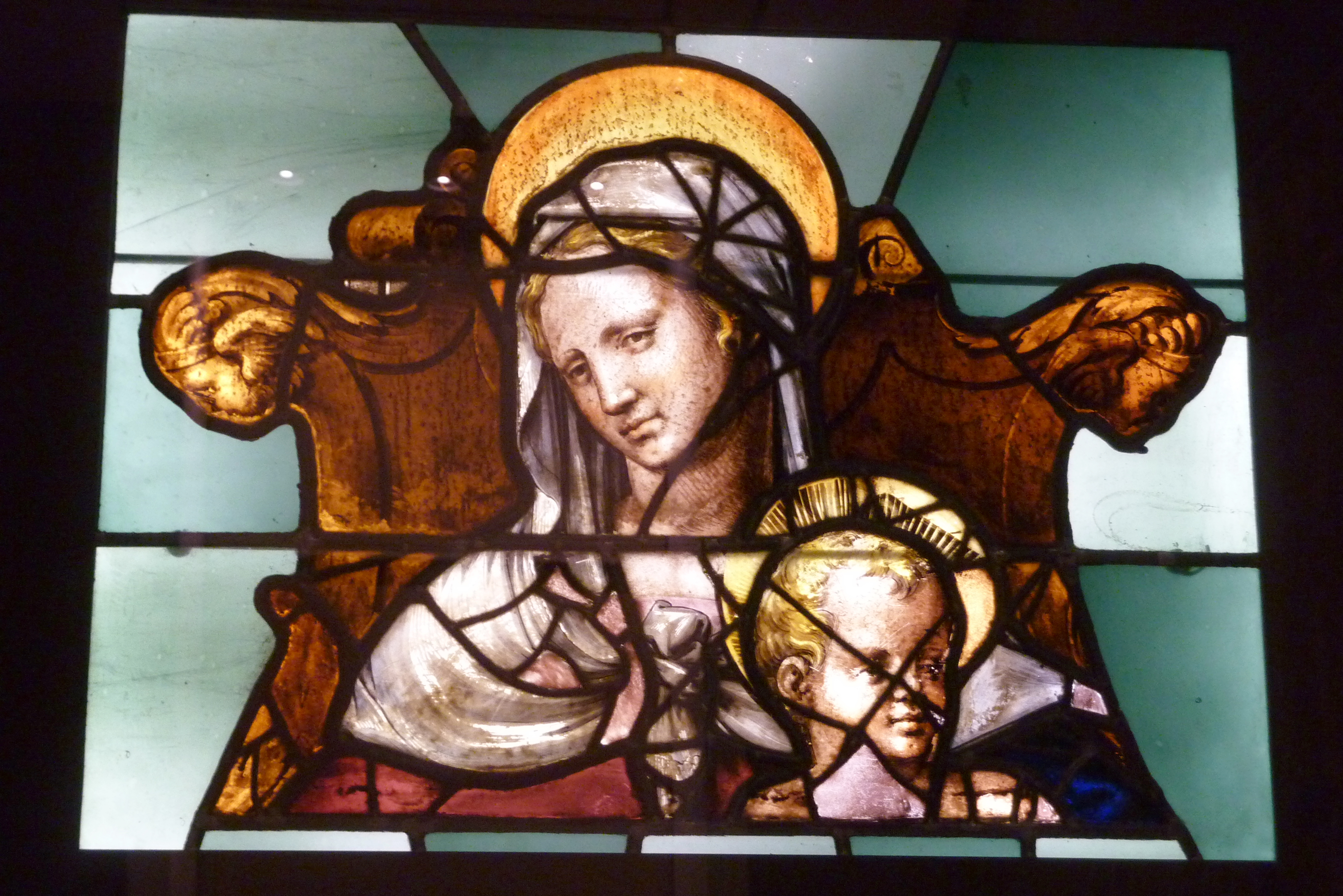 Bleiglasfenster (Ausschnitt) im Louvre (Paris)